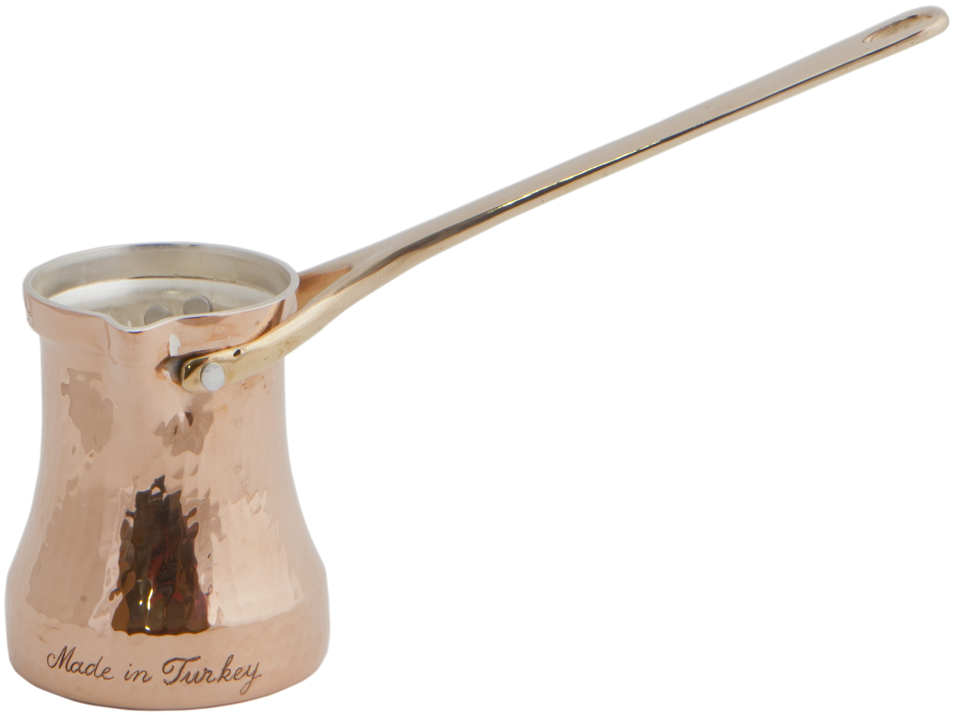 Джезва Soy. Мiдь, ручна ковка, внутрiшне срiбне покриття, Туреччина.